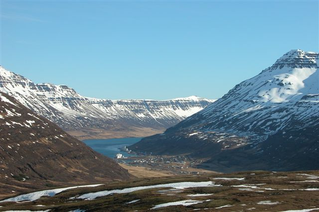 Seyðisfjörður